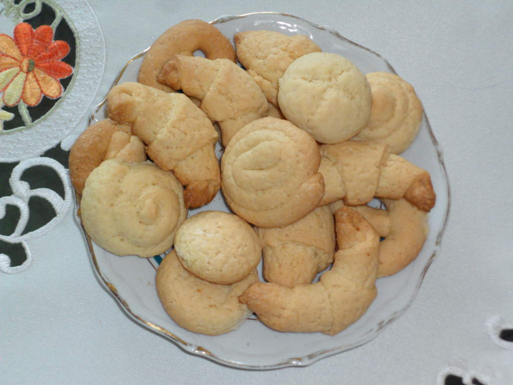 Schläsch: Wormboader Gebäck ies anne Gebäckspezioalität aus Wormboad.